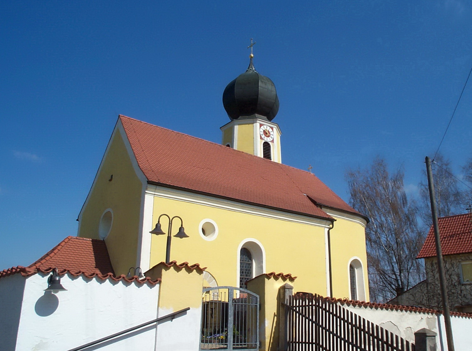 Gailsbach, Am Kirchplatz 6. Kath. Filialkirche St. Stephan, Saalbau mit eingezogenem Chor, Chorflankenturm mit Spitzdach und Vorzeichen, im Kern spätromanisch, um 1150/1200, Chor Anfang 18. Jh., Turm 1721; mit Ausstattung.